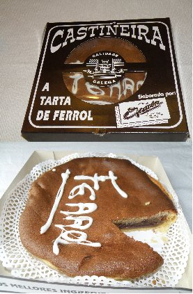 'Castinheira' ou tarte de Ferrol (Galiza), feita a partir de um produto típico: a castanha.